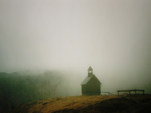 Nebel auf dem Passo di Valles